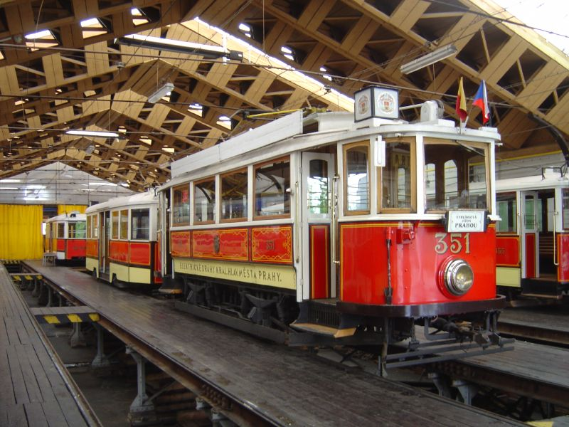 Praha Muzeum DP